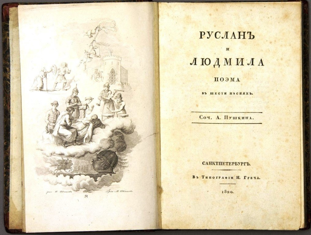 Руслан и Людмила первое издание/ Пушкин, А. Руслан и Людмила : поэма в шести песнях рис. И. Иванова, гравировал М. Иванов ; цензор И. Тимковской. - СПб. В Типографии Н. Греча, 1820. - 142 с., [1] л. ил.